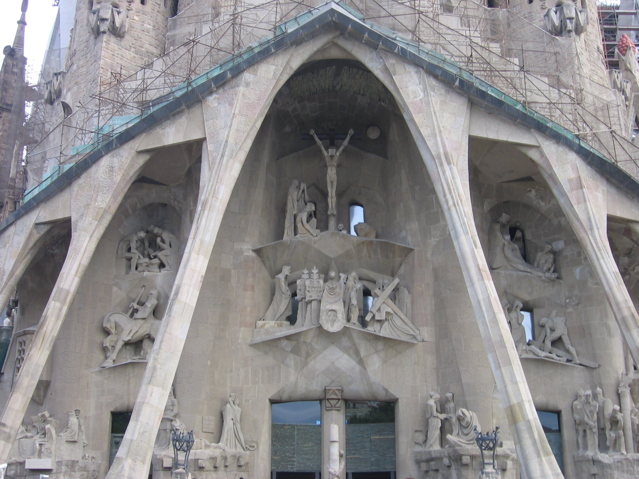 Fachada de la Pasión de la Sagrada Familia.